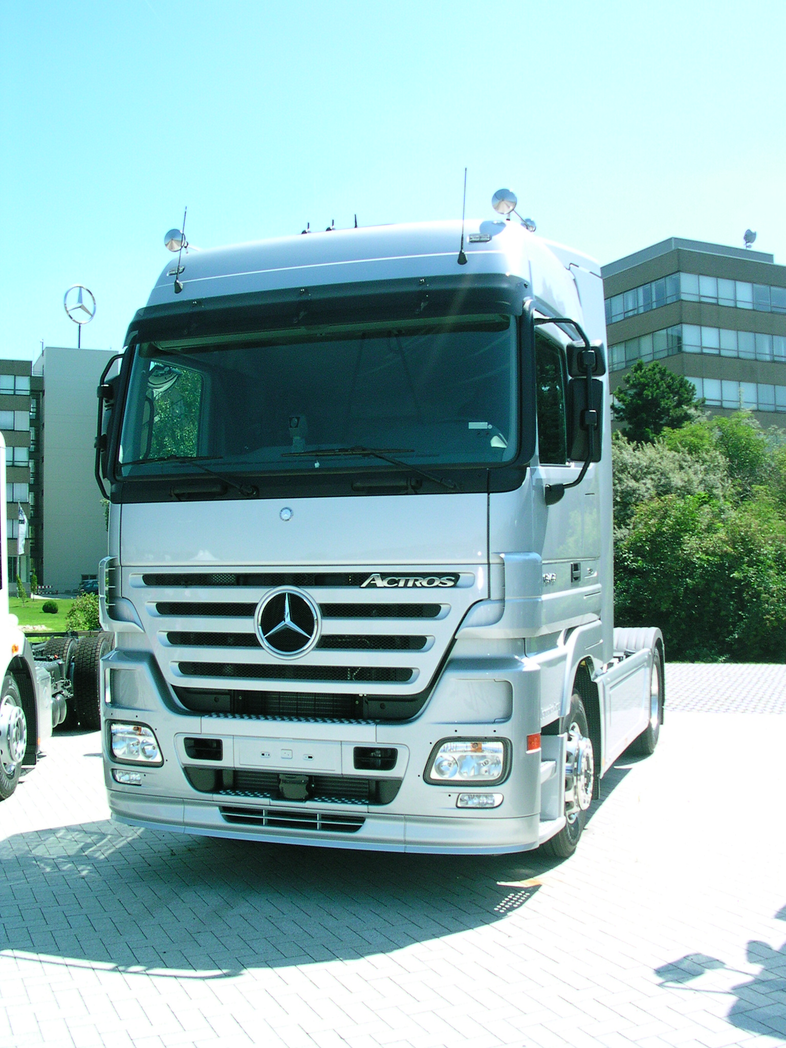 großes Oldtimertreffen im Mercedes-Werk in Wörth am Rhein 2006